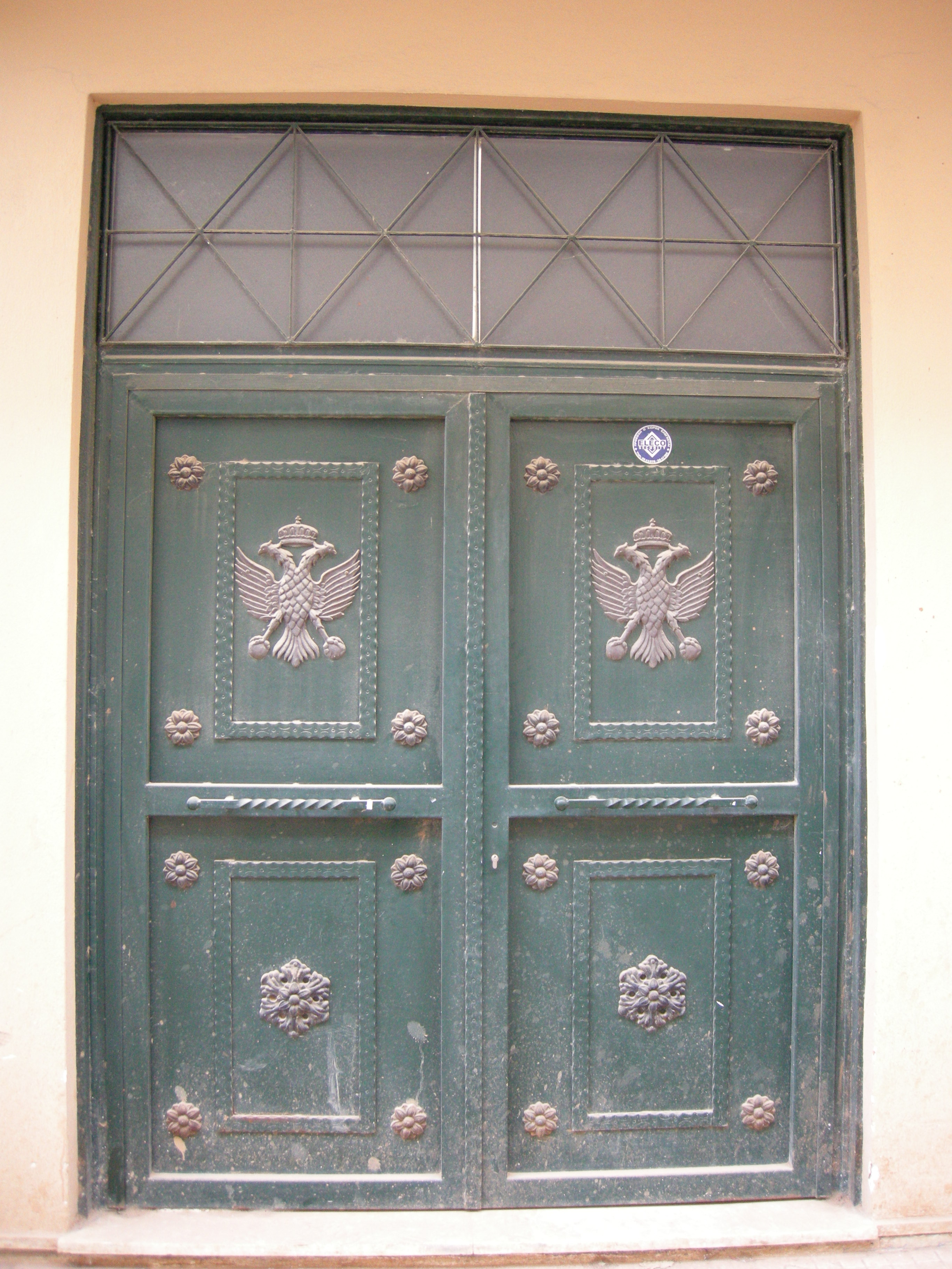 Gythios